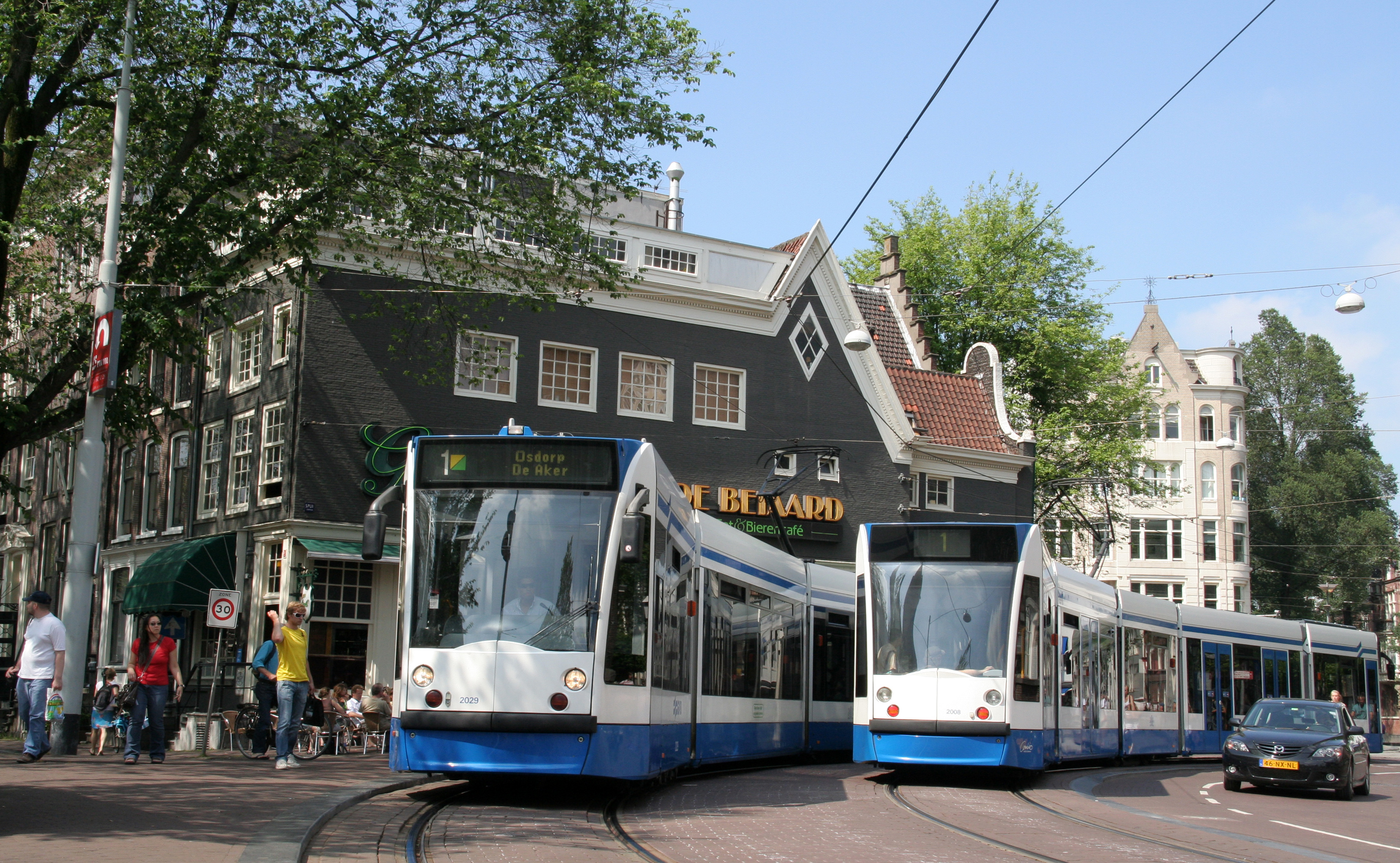 Trams van lijn 1 in Amsterdam op het Spui.